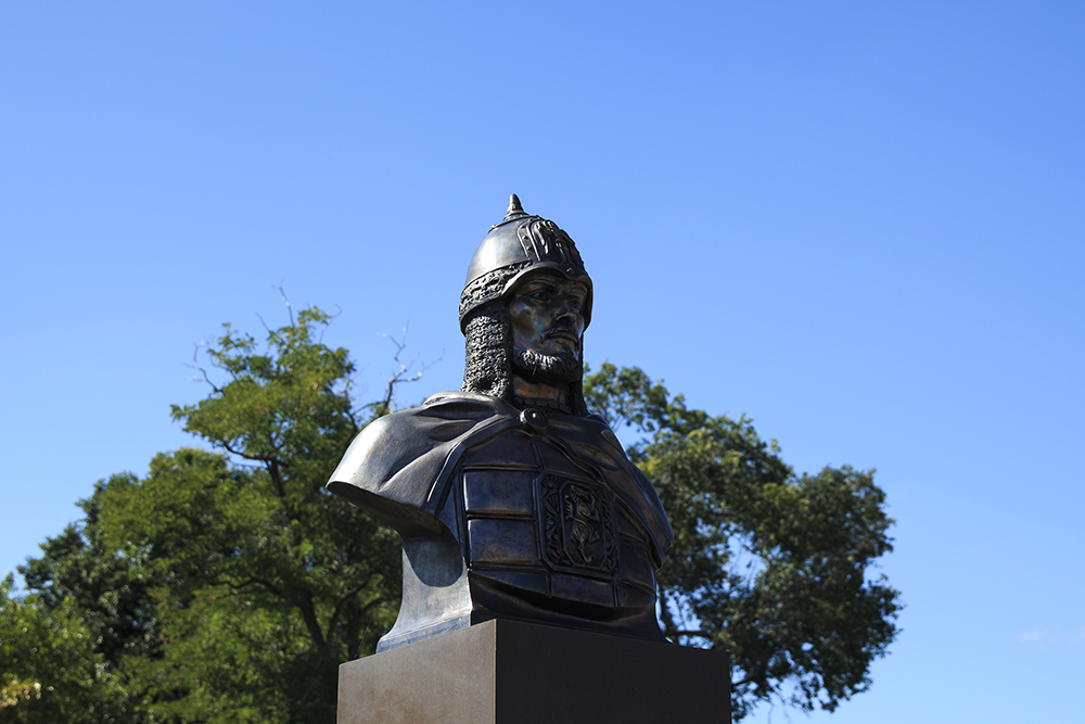 Памятник Александру Невскому в Бендерах